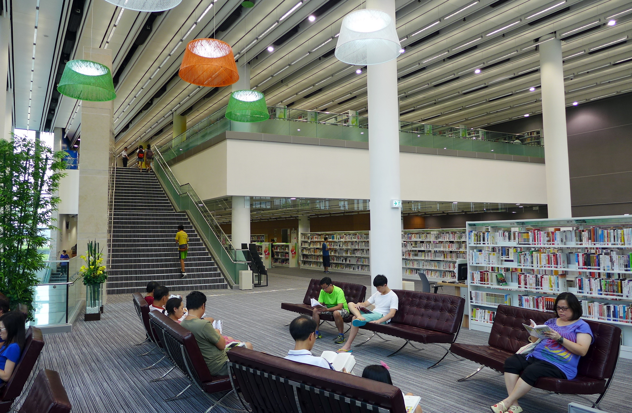 Tiu Keng Leng Public Library